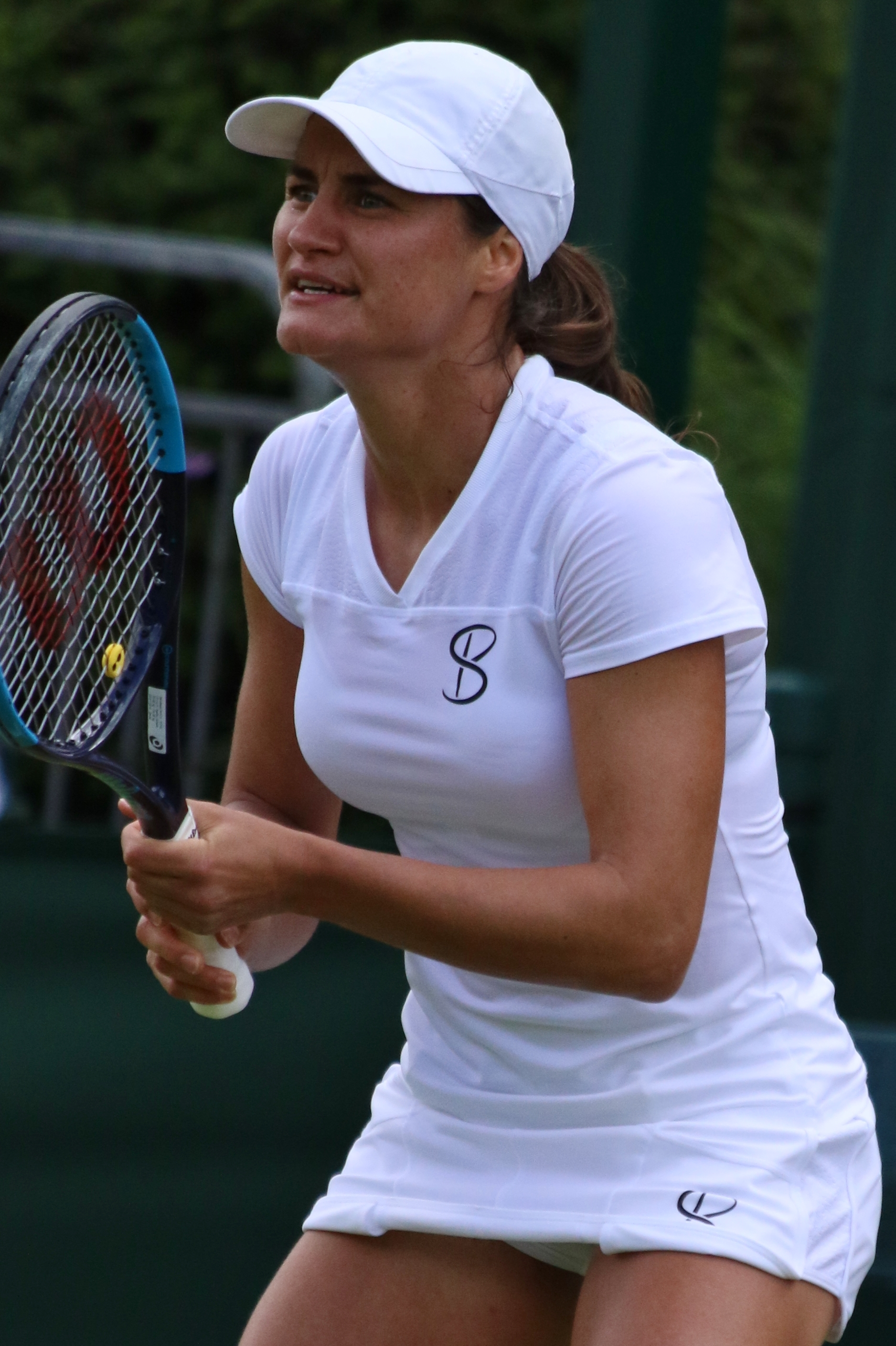 Niculescu WM19 (7)